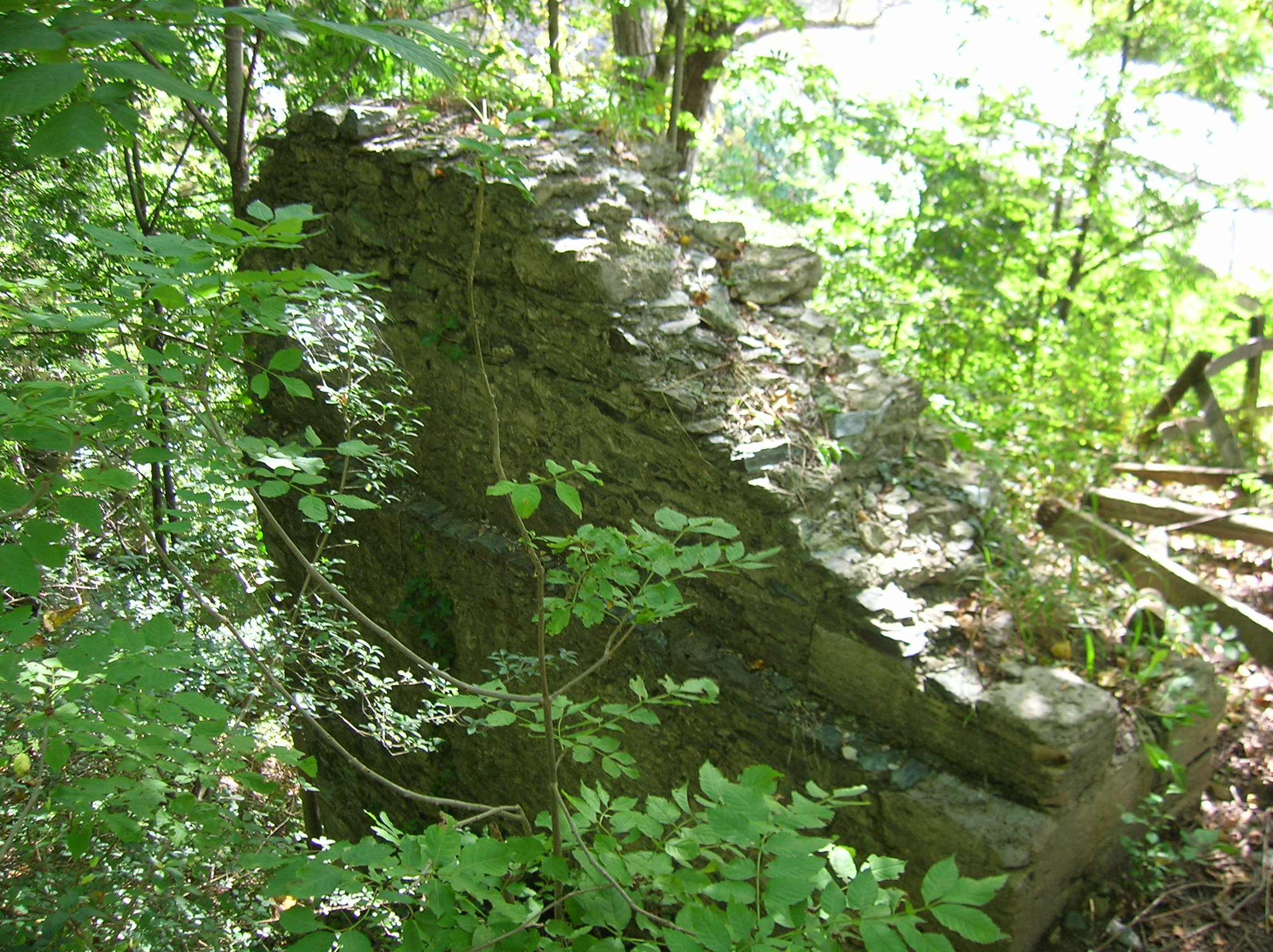 Ponte Romano sulla Via delle Gallie, Saint-Vincent, Valle d'Aosta, Italia. This is a photo of a monument which is part of cultural heritage of Italy.